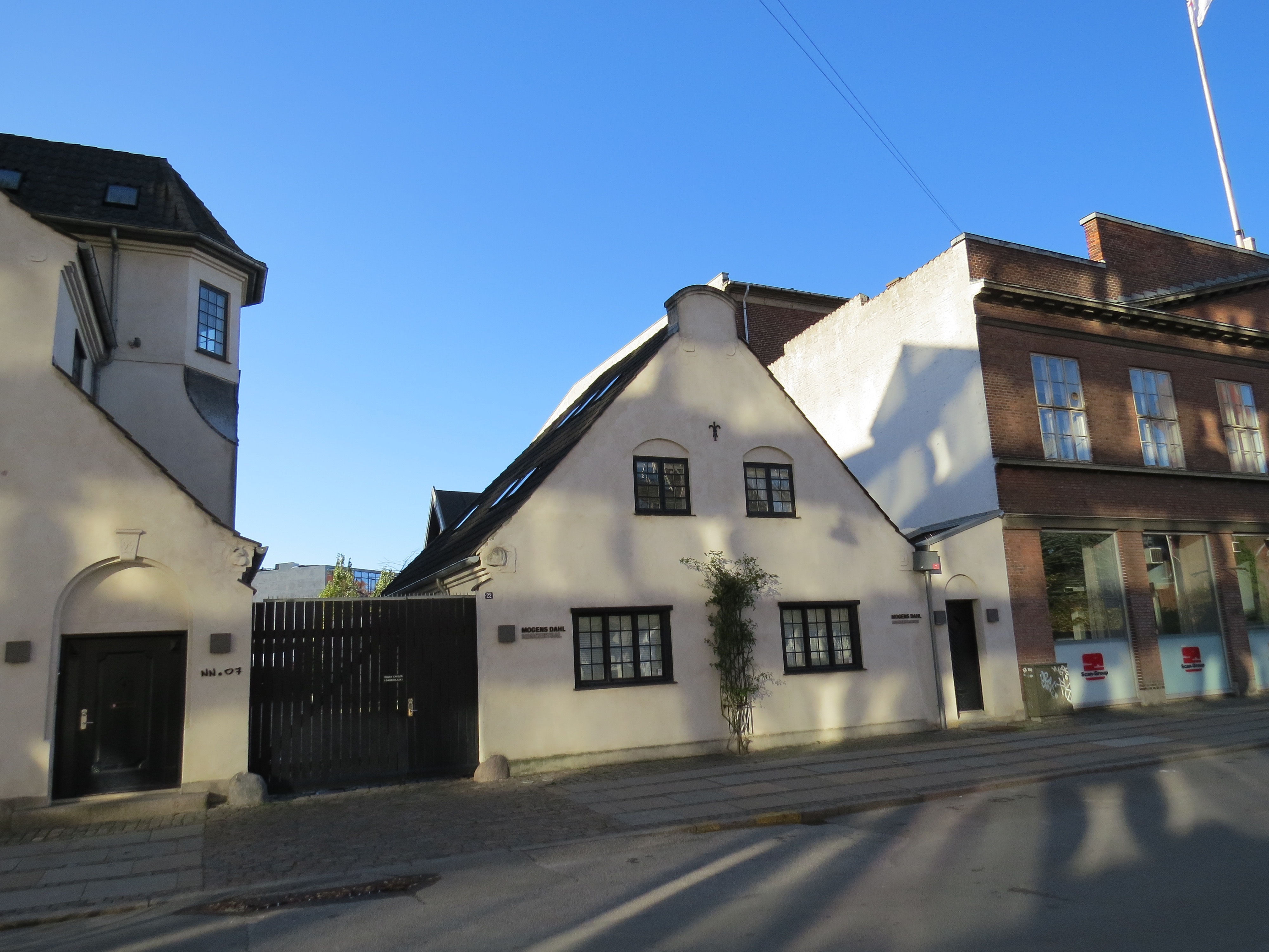 Mogens Dahl Koncertsal, København